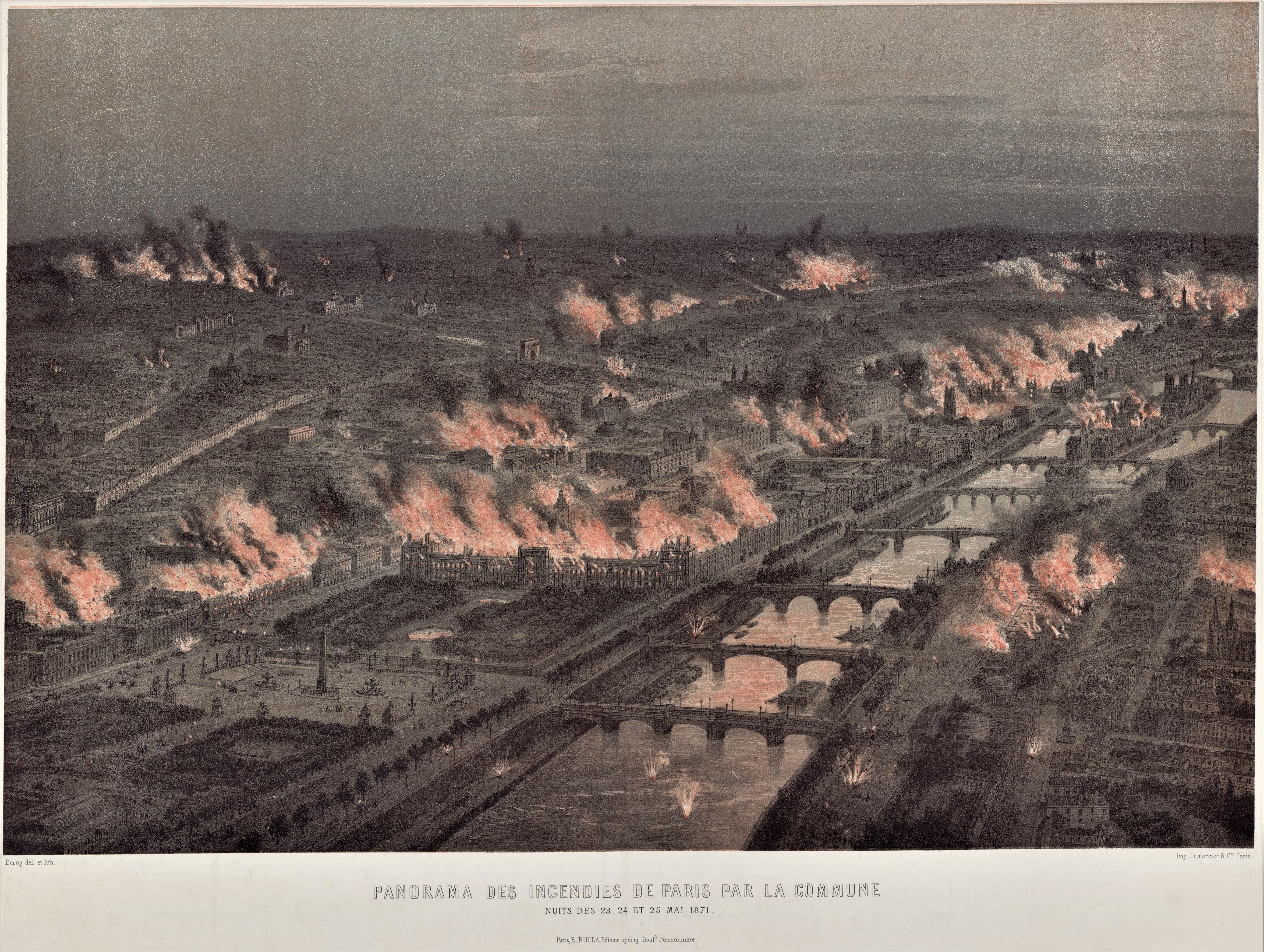 Exposition La Commune de Paris à l'Hôtel de Ville de Paris (18 mars - 28 mai 2011) - Panorama des incendies dans Paris du 23 au 25 mai - Lithographie d'Emile Deroy - Musée Carnavalet.